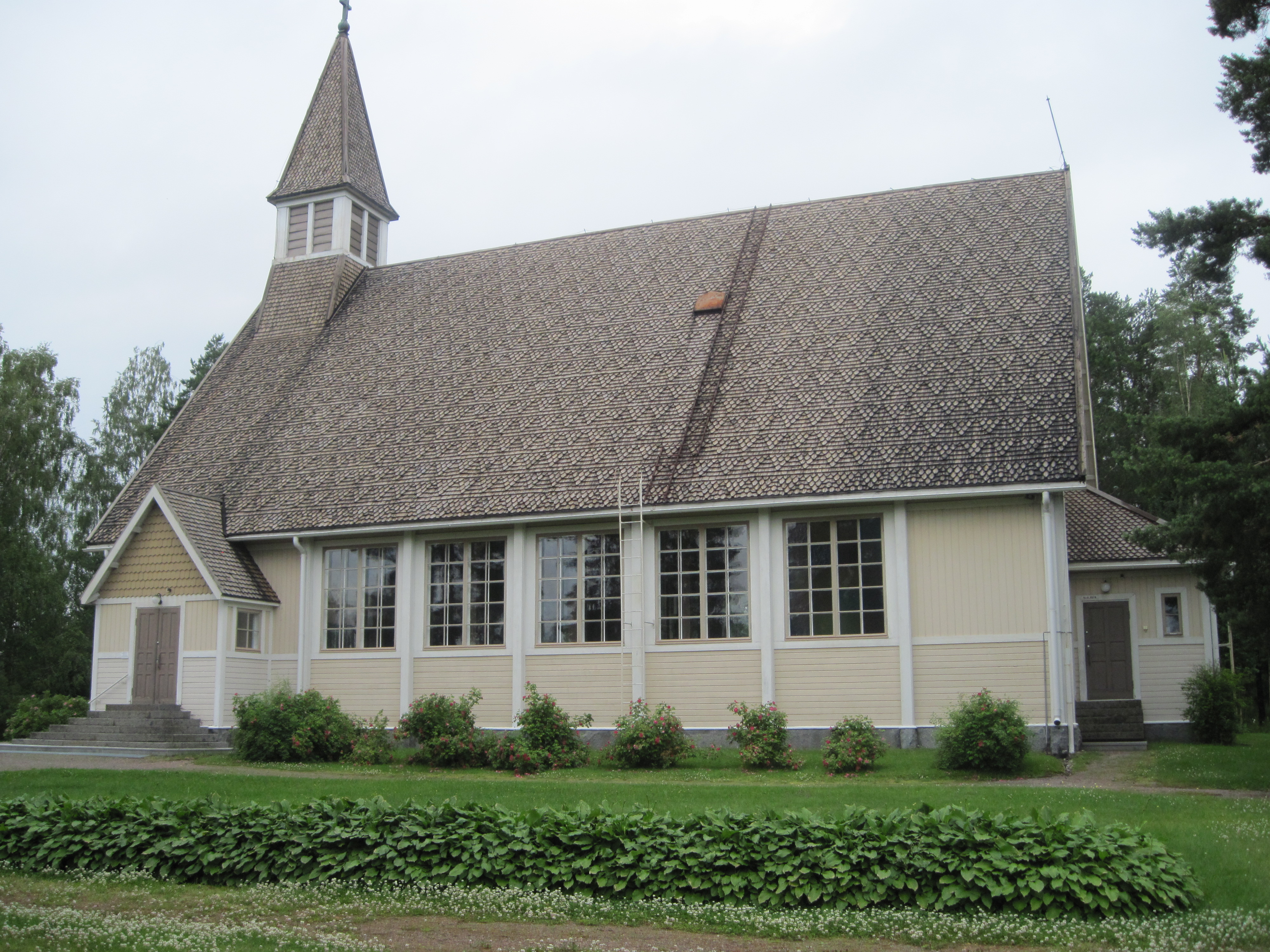 Kihniön kirkko kesällä 2012